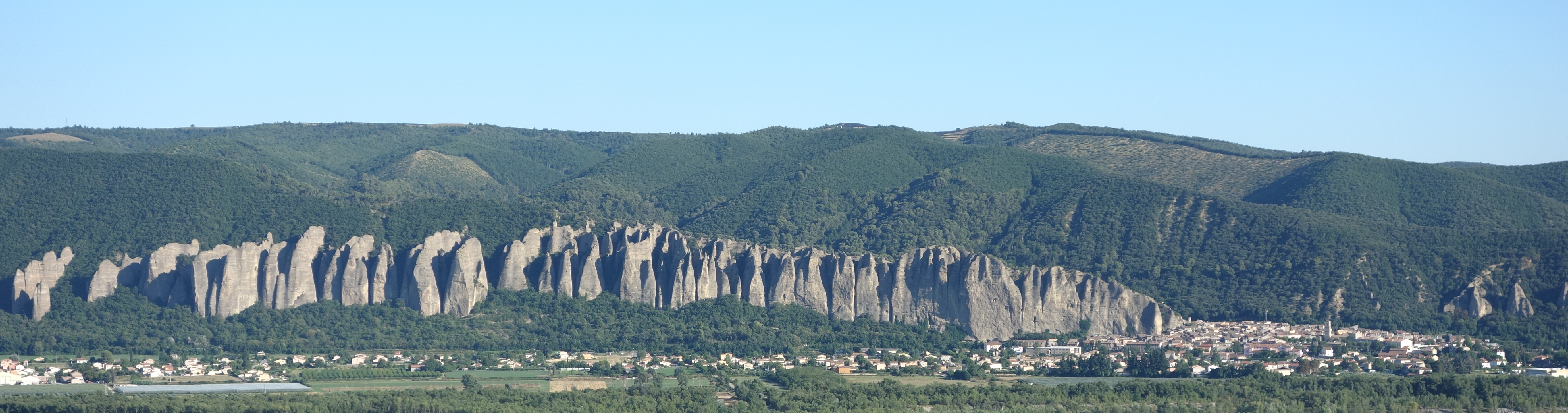 Molassefelsen „Les Pénitents“ (Die Büßer), Plateau de Valensole, Alpes-de-Haute-Provence.